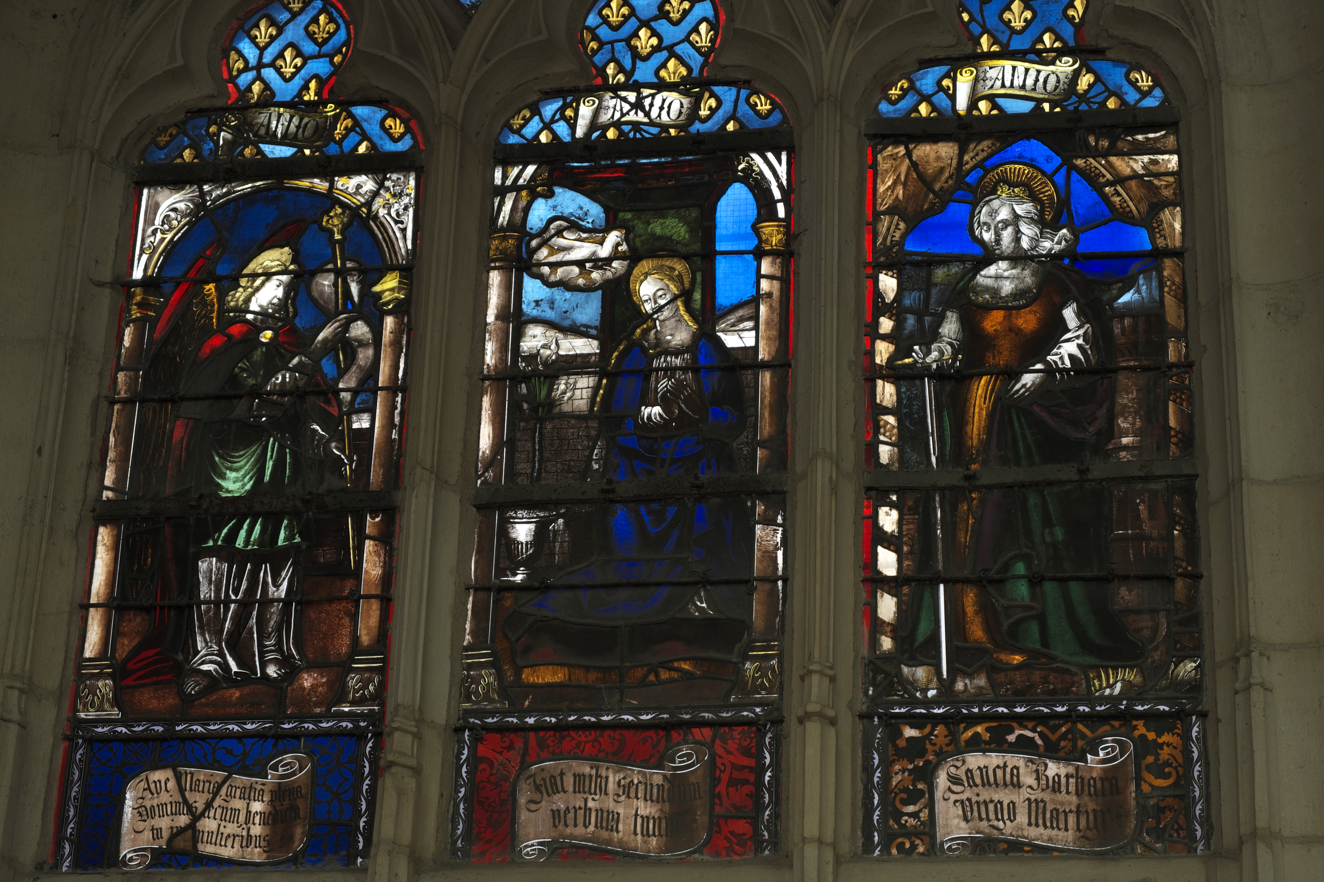 Bleiglasfenster (Baie 19) in der Basilika Saint-Nicolas in Saint-Nicolas-de-Port im Département Meurthe-et-Moselle (Lothringen/Frankreich), mit Fragmenten aus der Renaissance, 1850 von Napoléon Rives und Désiré Laurent ergänzt; Darstellung: Verkündigungsgruppe (links), um 1510, aus Lothringer Werkstatt, hl. Barbara (rechts)